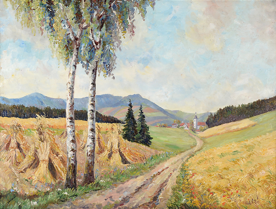 Sommerlandschaft